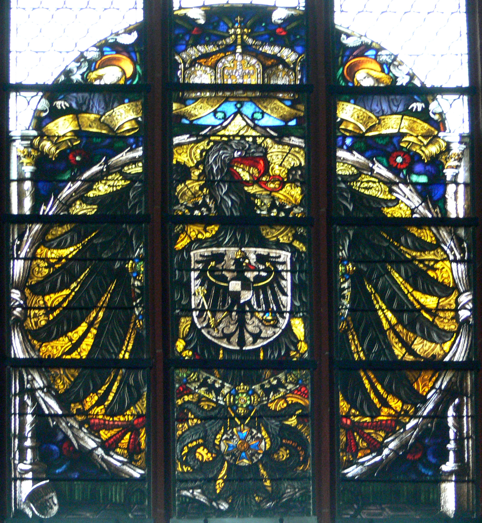 Katholische Pfarrkirche St. Georg, Ulm (Donau), ehemalige katholische Garnisonskirche Glasfenster im Chor: Wappen, Werkstatt Alexander Linnemann (Frankfurt am Main), 1904